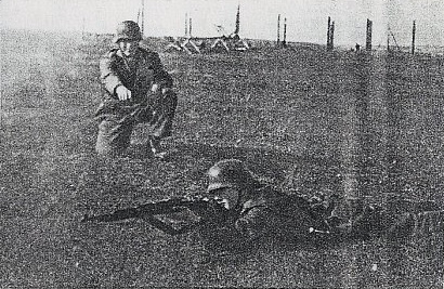 Беларуская (тарашкевіца): Беларускі камандовец індывідуальна вучыць жаўнера (13-ы беларускі батальён СД)